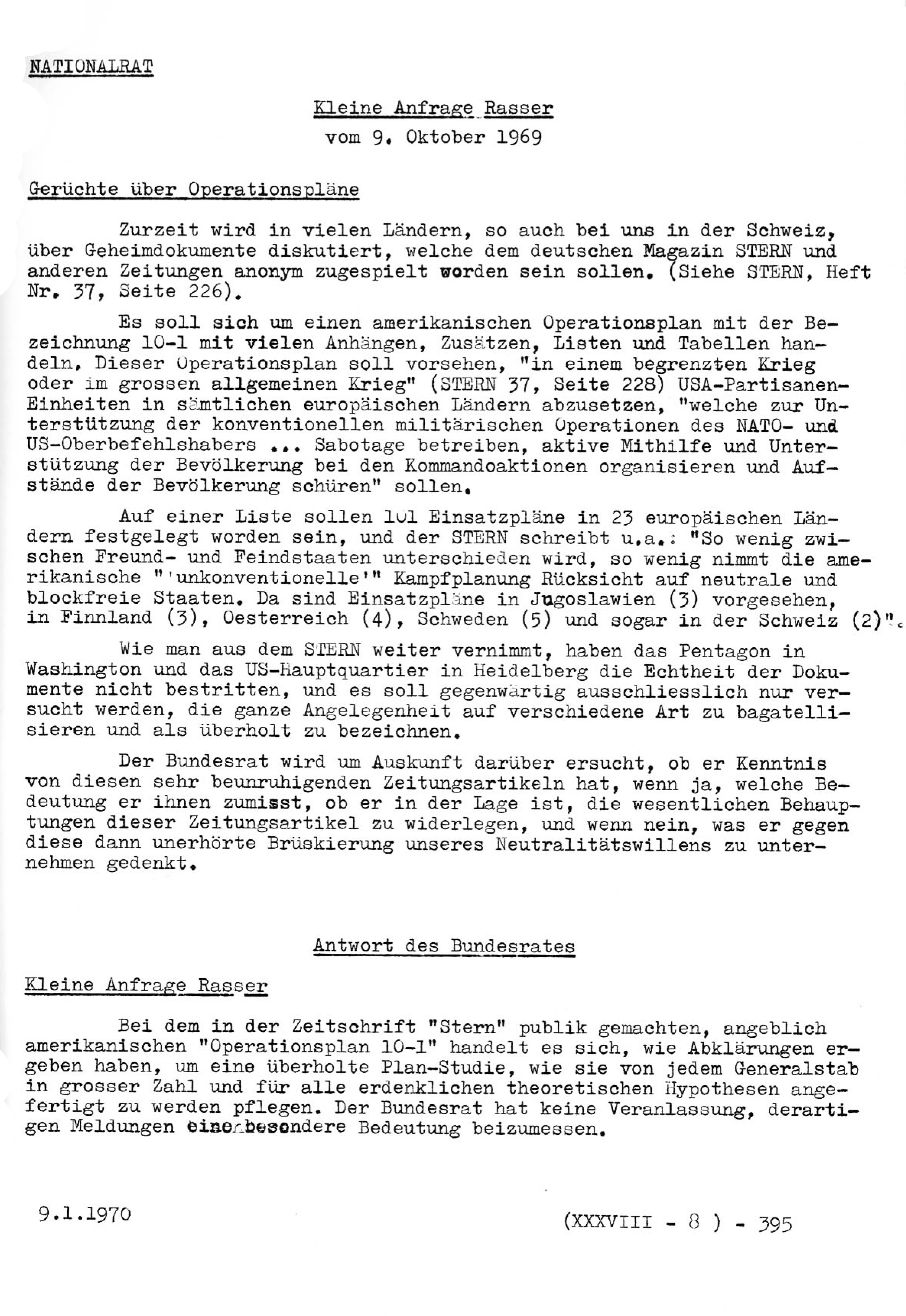 Kleine Anfrage von Nationalrat Alfred Rasser, Basel, Landesring der Unabhängigen (HD Läppli), in Sachen Partisaneneinheiten der USA in der Schweiz